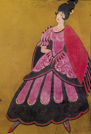 Costume Design for Opera Carmen